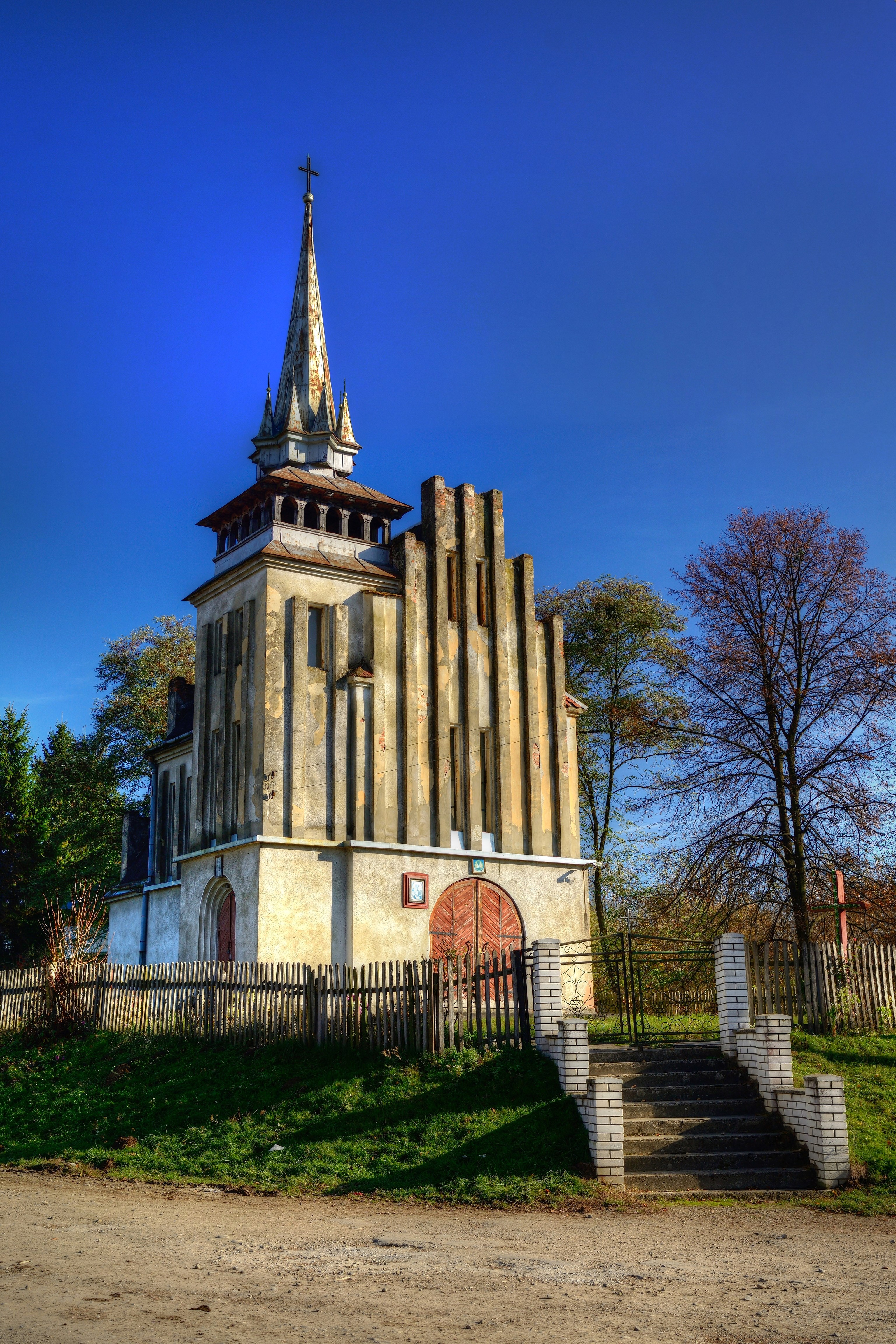 Цвітова Костел